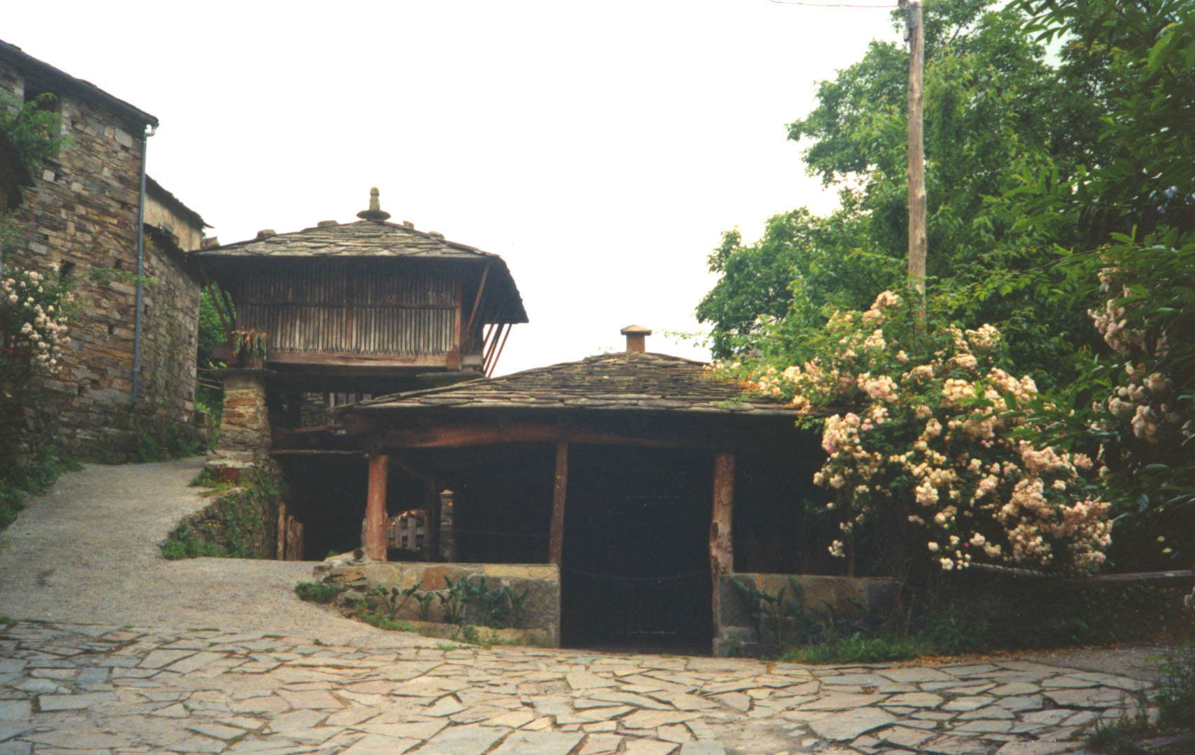 Taramundi (Asturias, España), conjunto etnográfico de Os Teixois; fotografía en papel. Taramundi (Asturias, Spain), Os Teixois ethnographic site. Paper photograph.